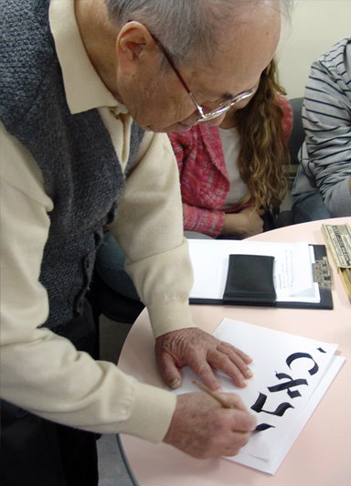 Zvi Narkiss